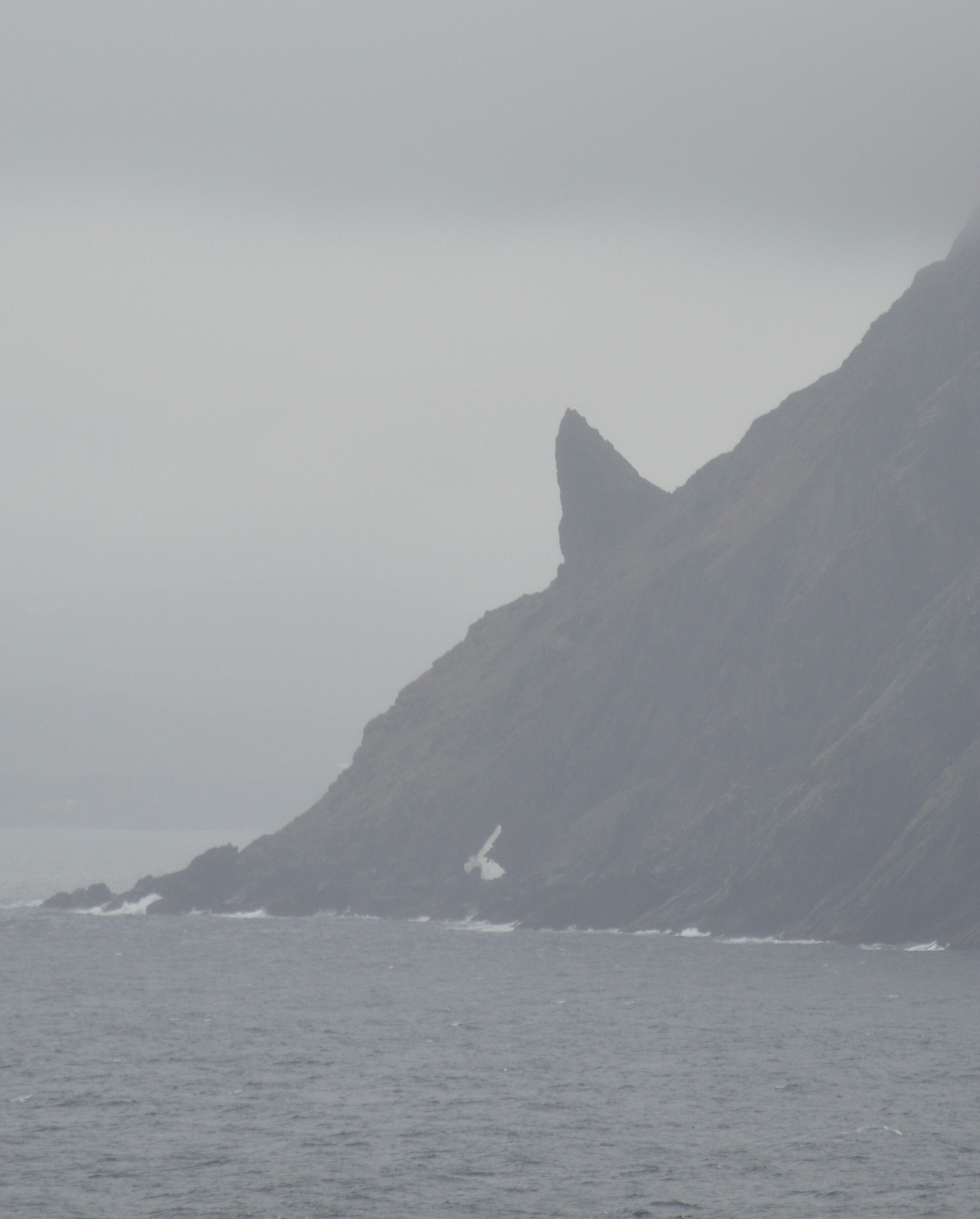 Nordkaphorn 2017